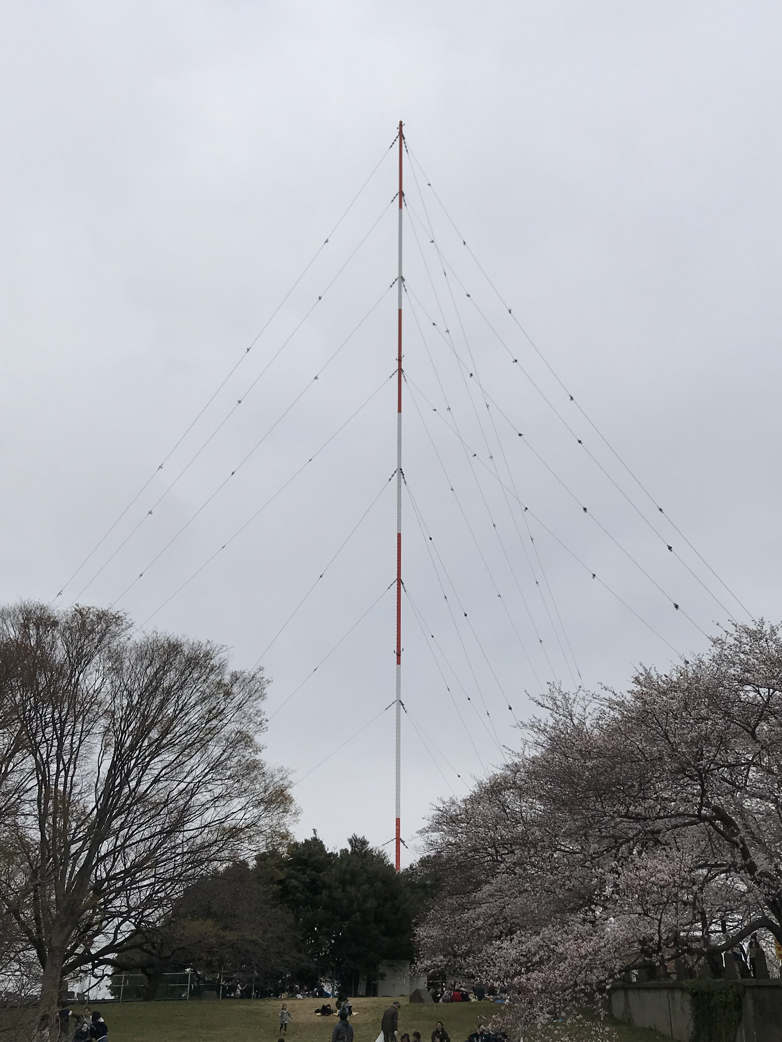 文化放送川口送信所アンテナ